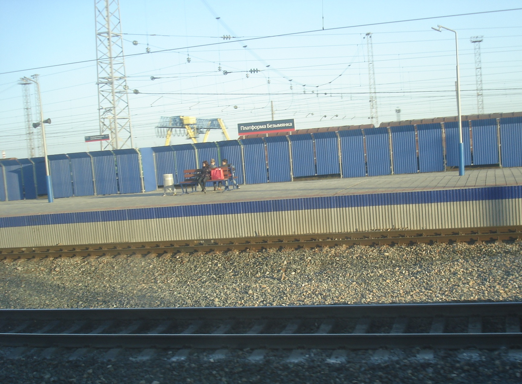 ЖД-станция Безымянка